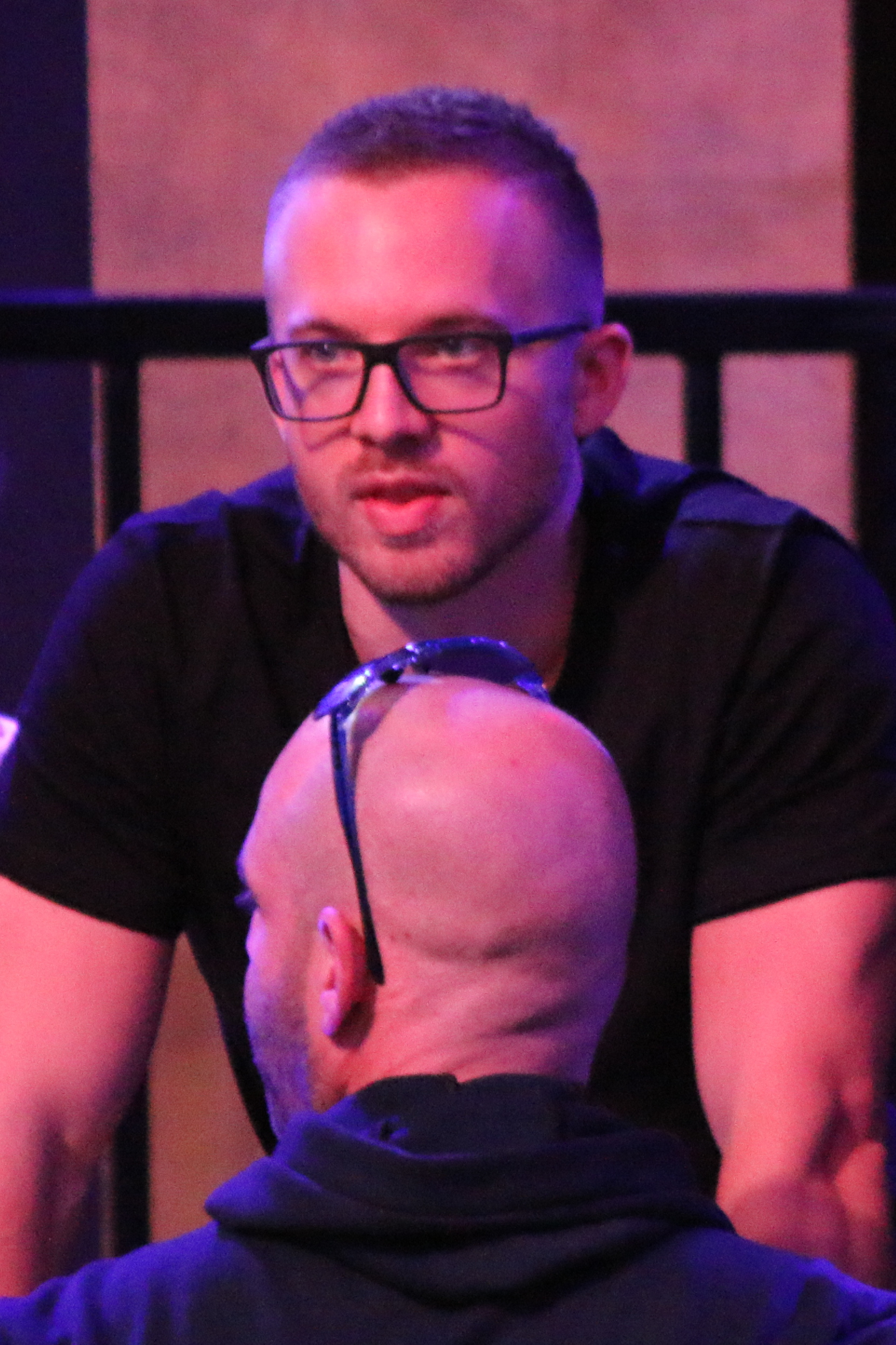 Martin Jacobson als Coach von Zvi Stern beim Finaltisch des Main Event der World Series of Poker 2015